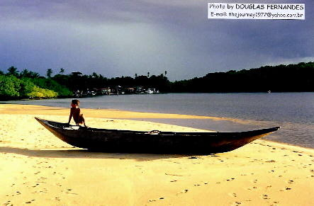 Rio Caraíva, Distrito de Caraíva, Porto Seguro, Bahia, Brasil.